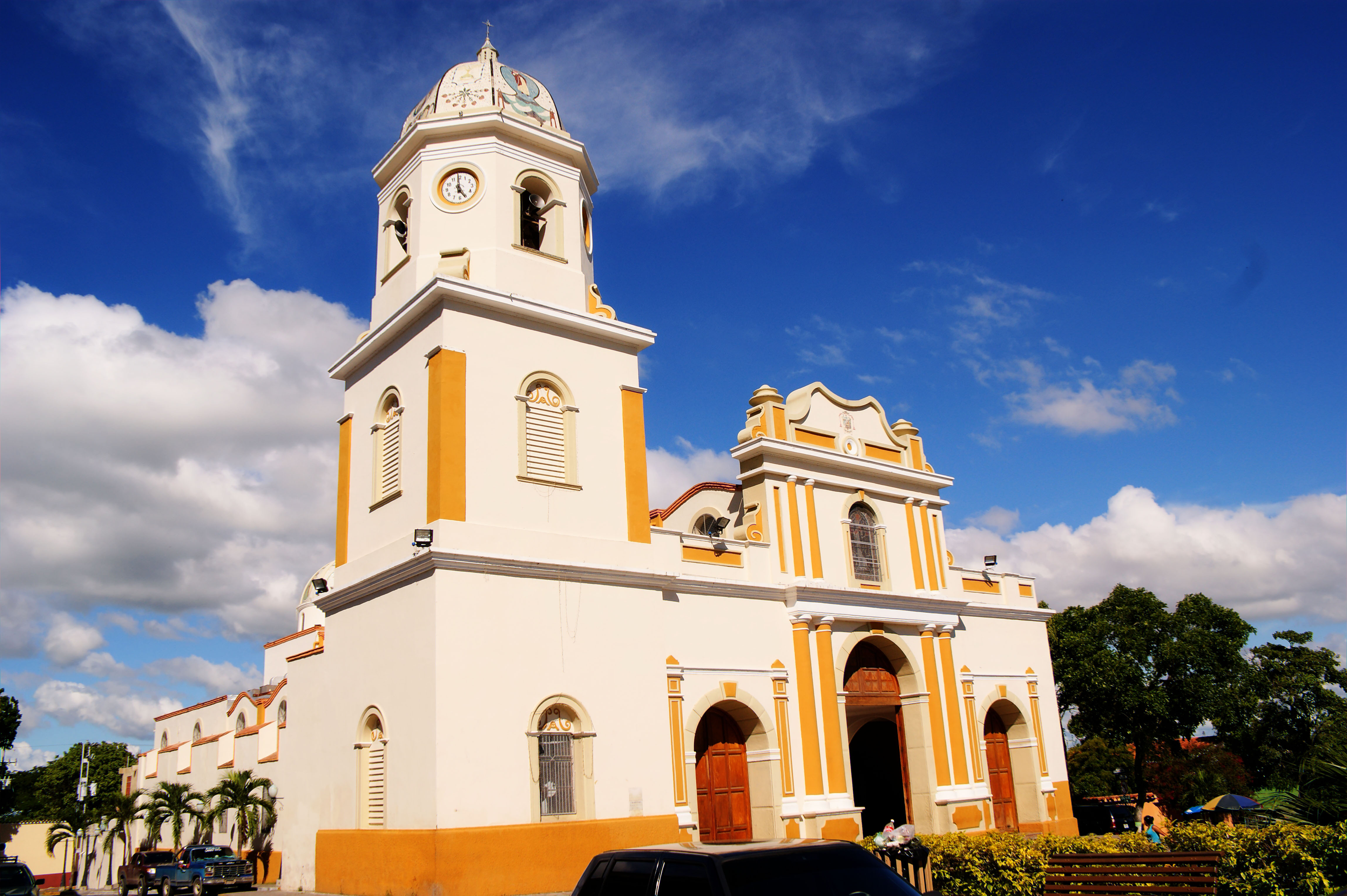 Hermosa Iglesia del pueblo de Santa Rosa en Barquisimeto